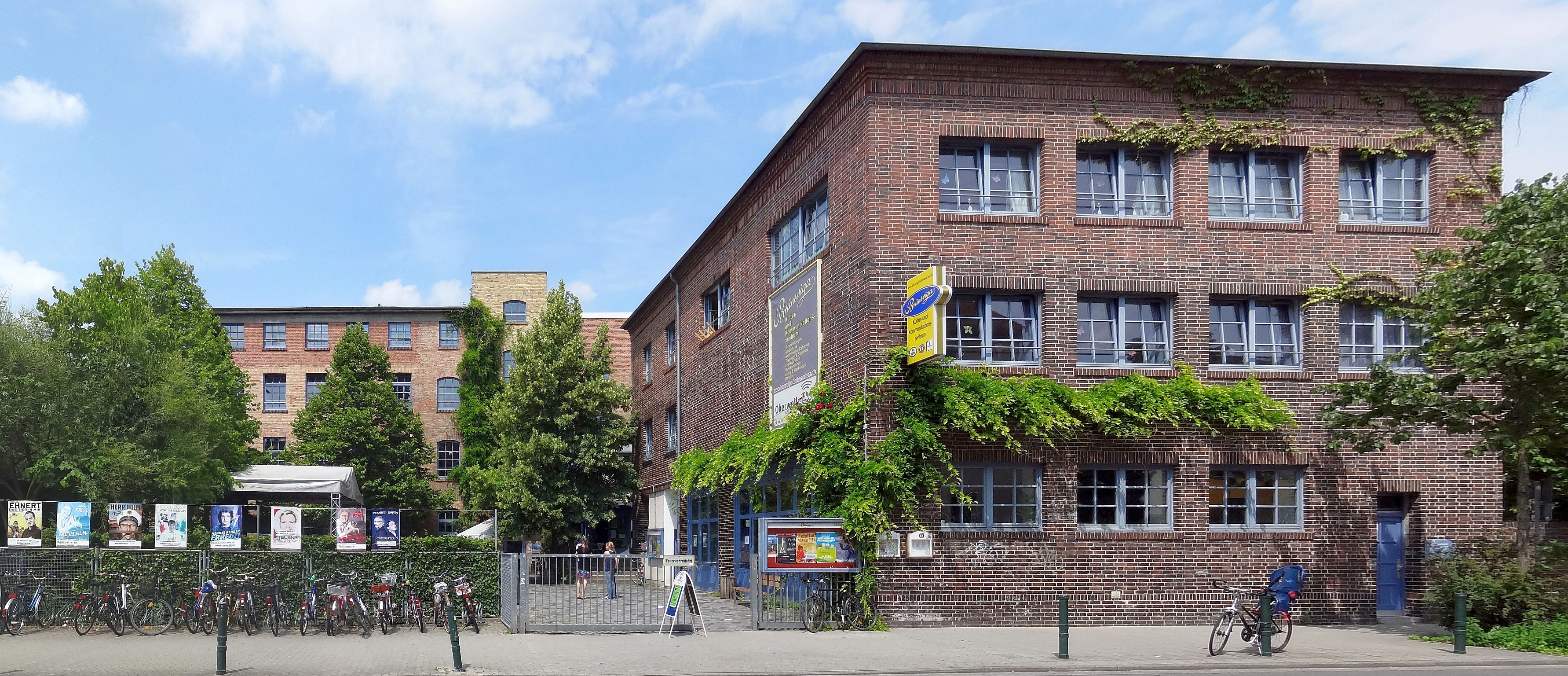 Brunsviga Kulturzentrum in der Karlstraße 35, Braunschweig. Im Hintergrund das ehemalige Produktionsgebäude; rechts das frühere Belegschaftshaus.